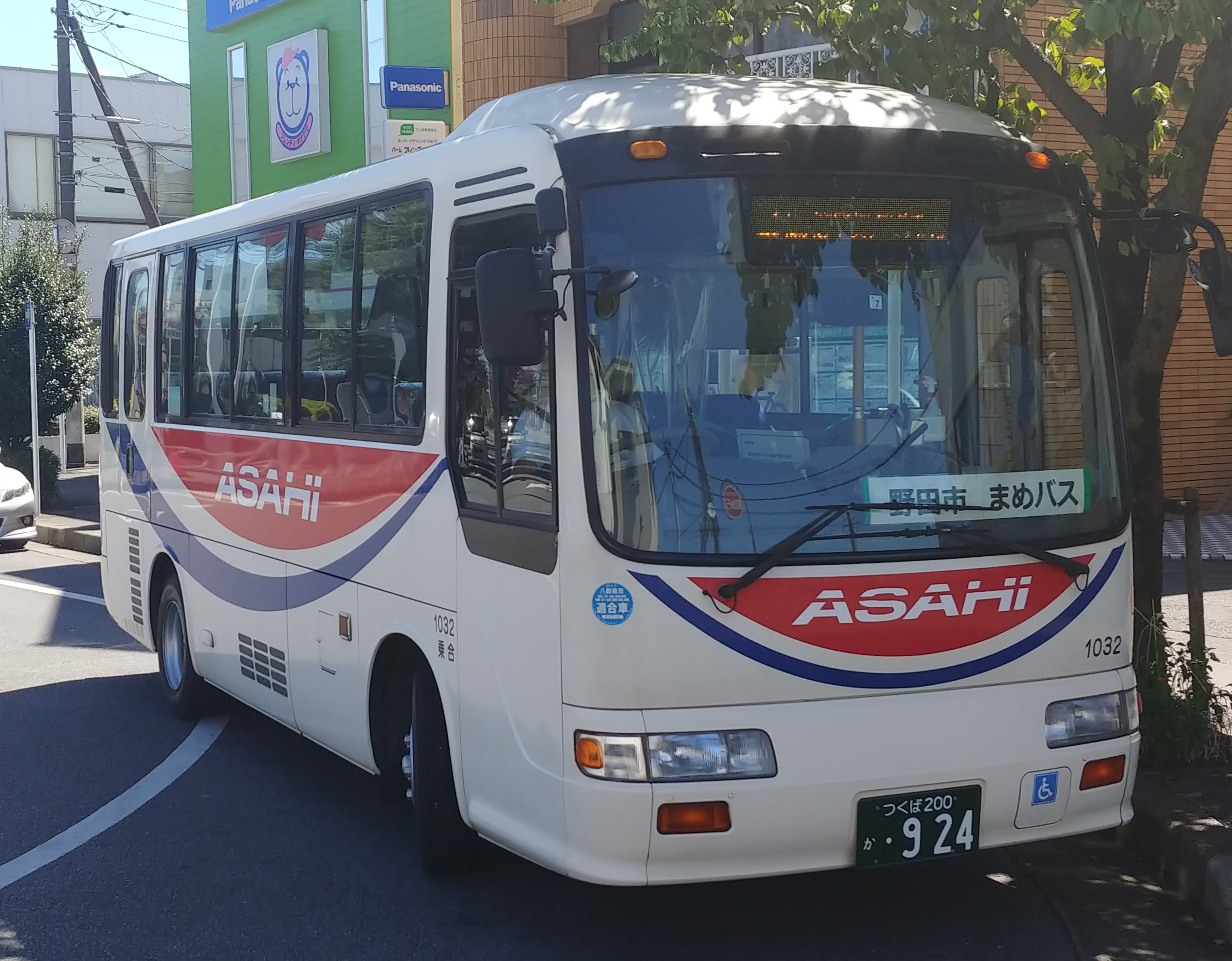 朝日自動車によって運行されるまめバスが代走を行っている様子です。